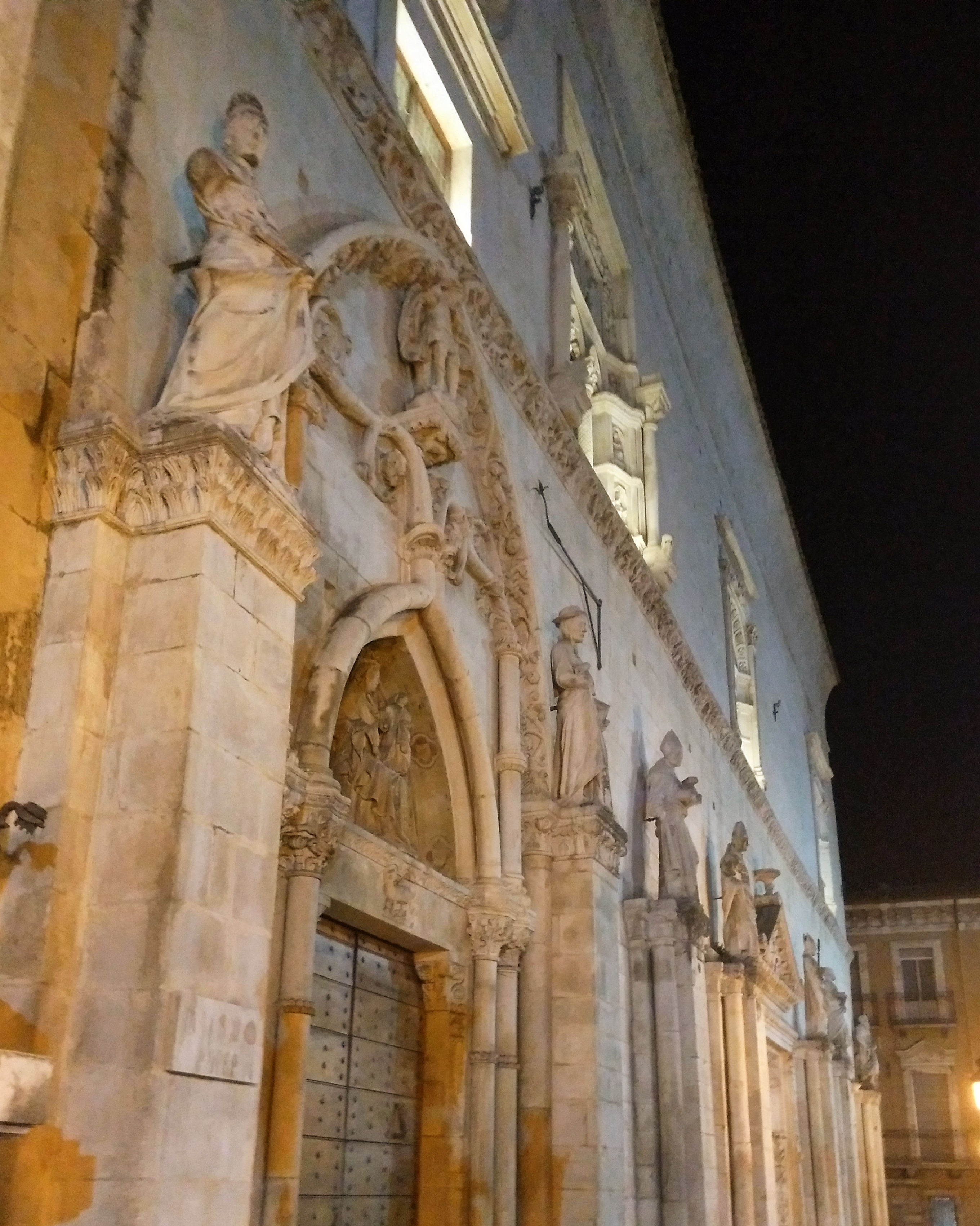 Sulmona